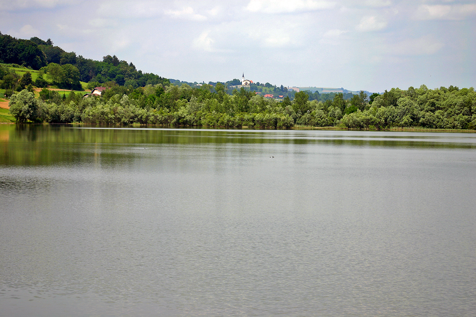 Ledavsko jezero Krašči - V ozadju Cerkev sv. Helene, Pertoča